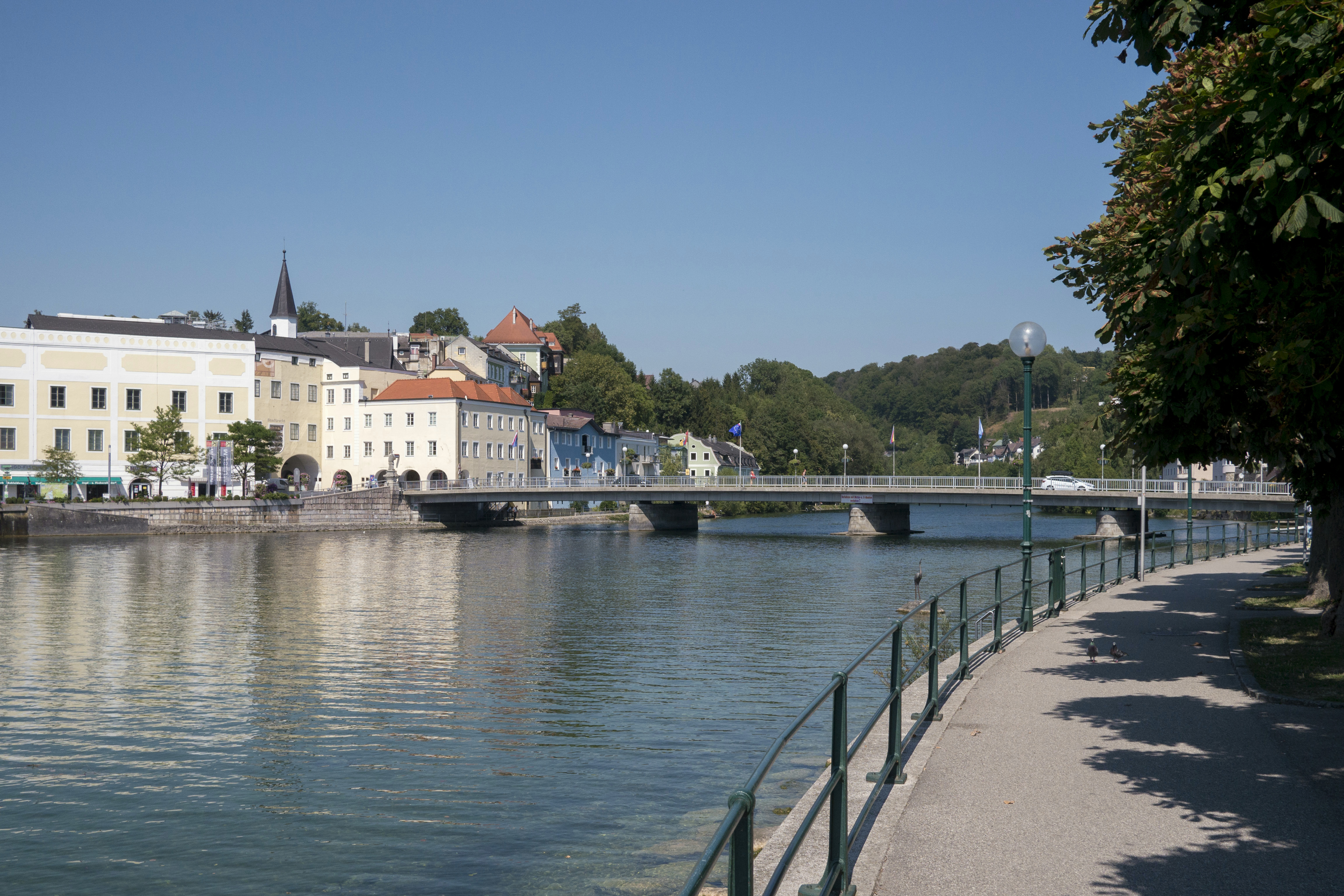 Gmunden Traunsee Abfluss, Brücke und links Ehem. Kammerhof, Mauthaus